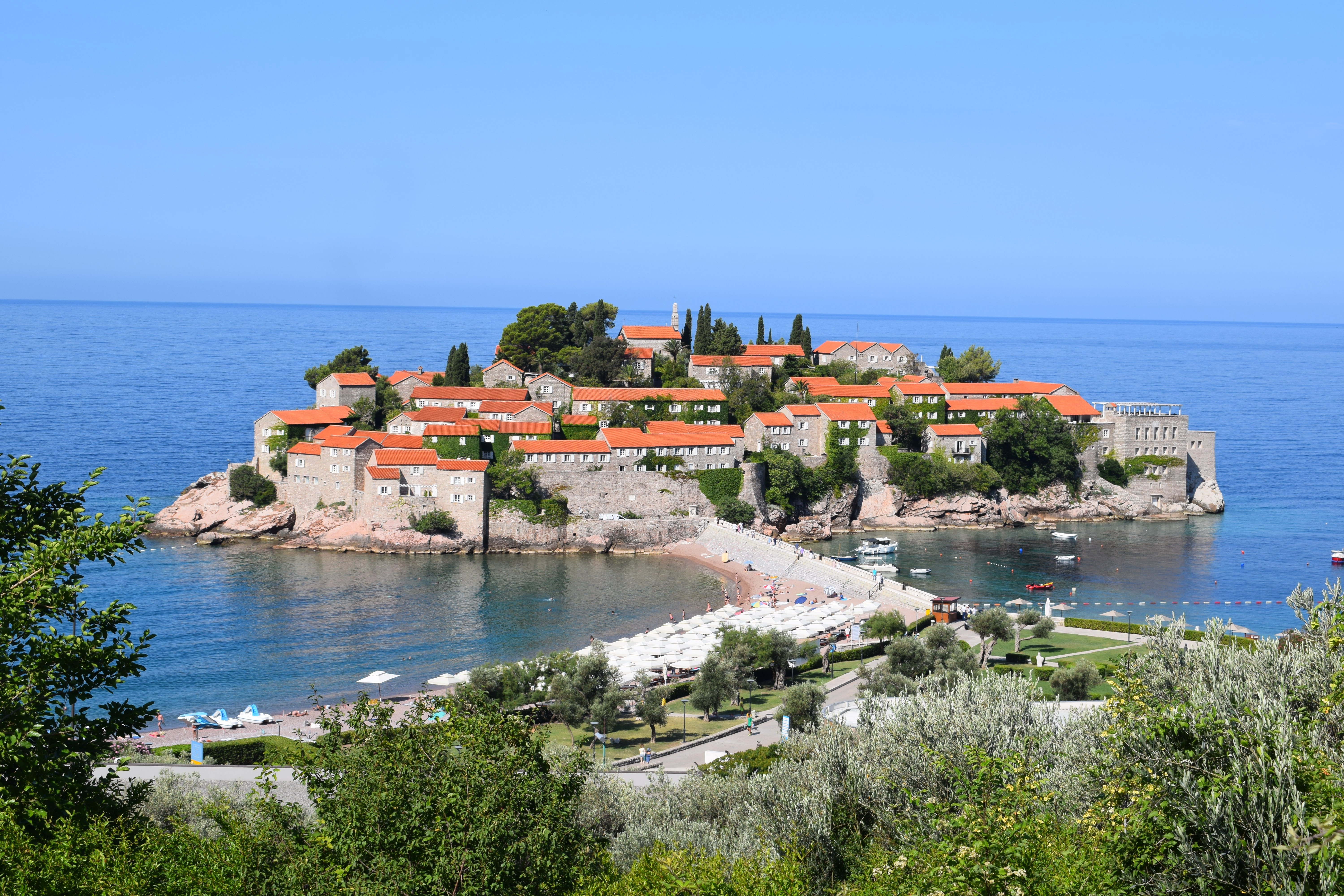 Sveti Stefan Island